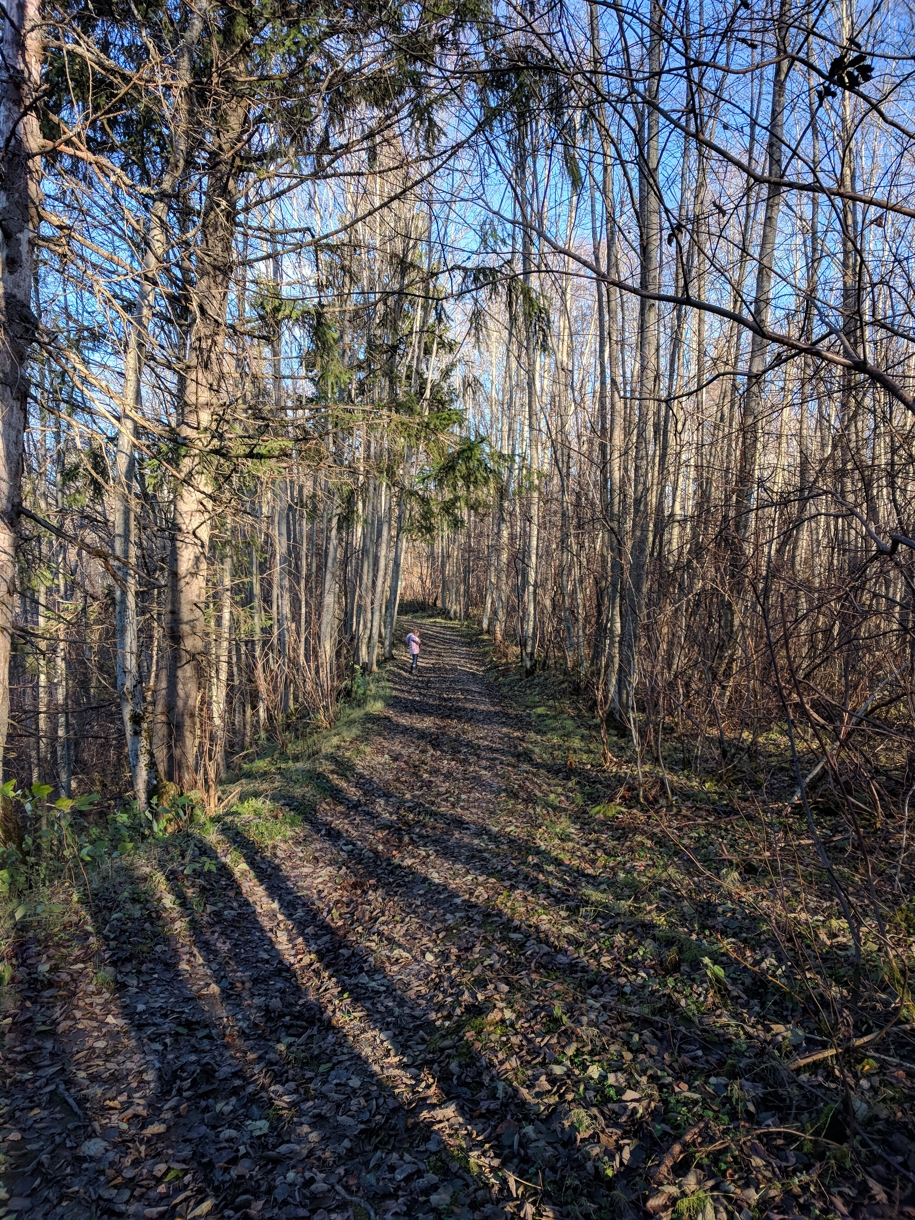 Stien som går gjennom Romerike landskapsvernområde fra enden av rullebanen på Gardermoen